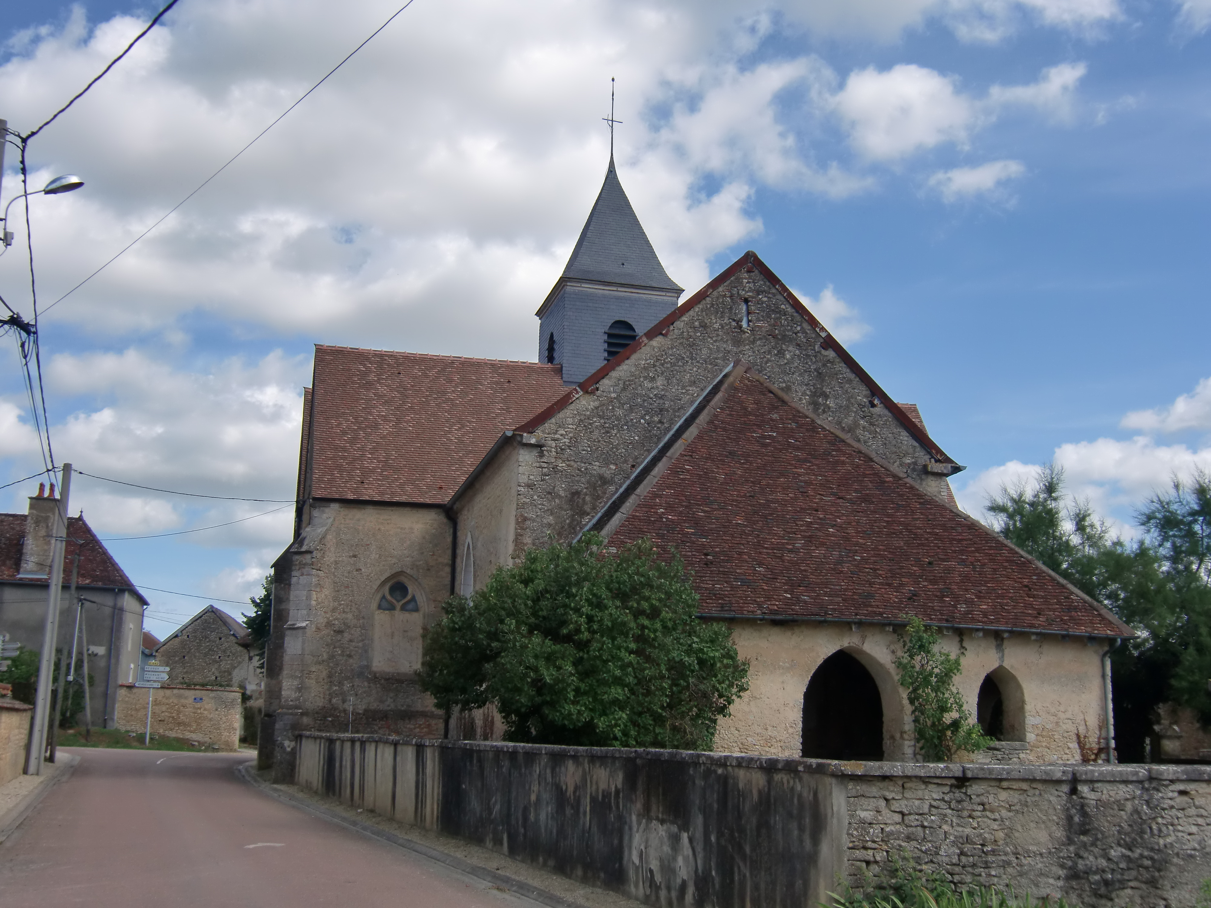 église de Thieffrain (Aube - Champagne - France)